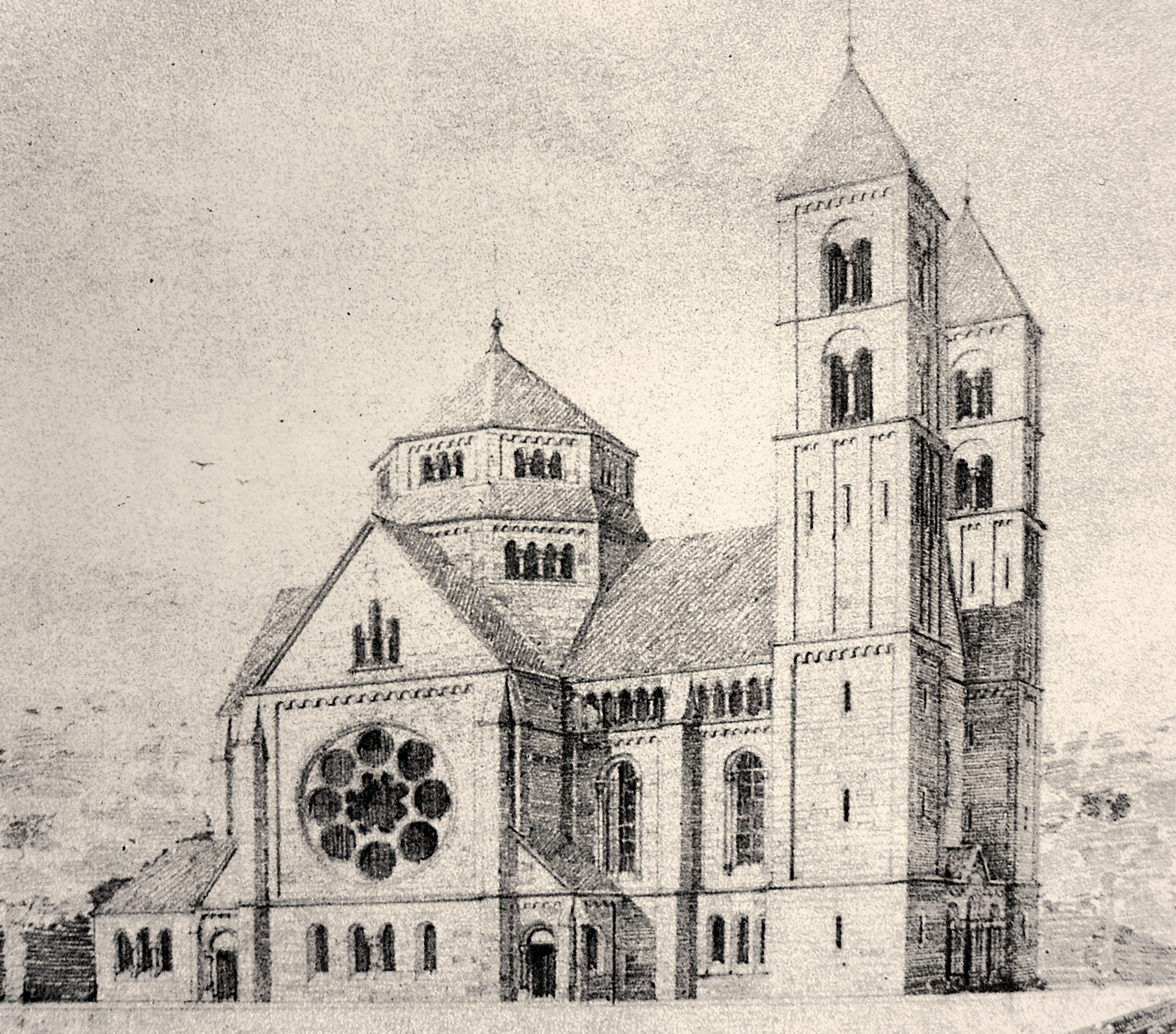 Evangelische Stadtkirche Metz (Temple Neuf (Metz)), Vorentwurf, Plansammlung 9 Fi 598, Archives municipales de Metz